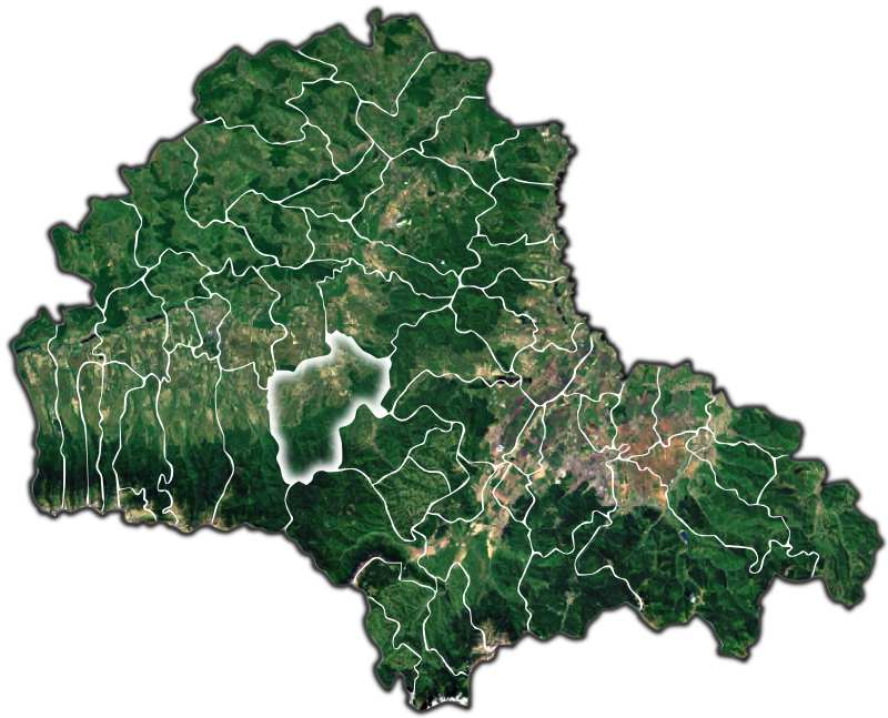 Sinca jud Brasov